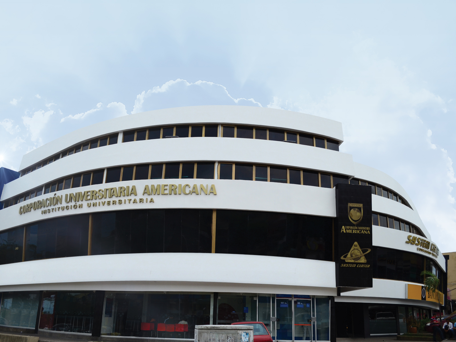 Sede Cosmos